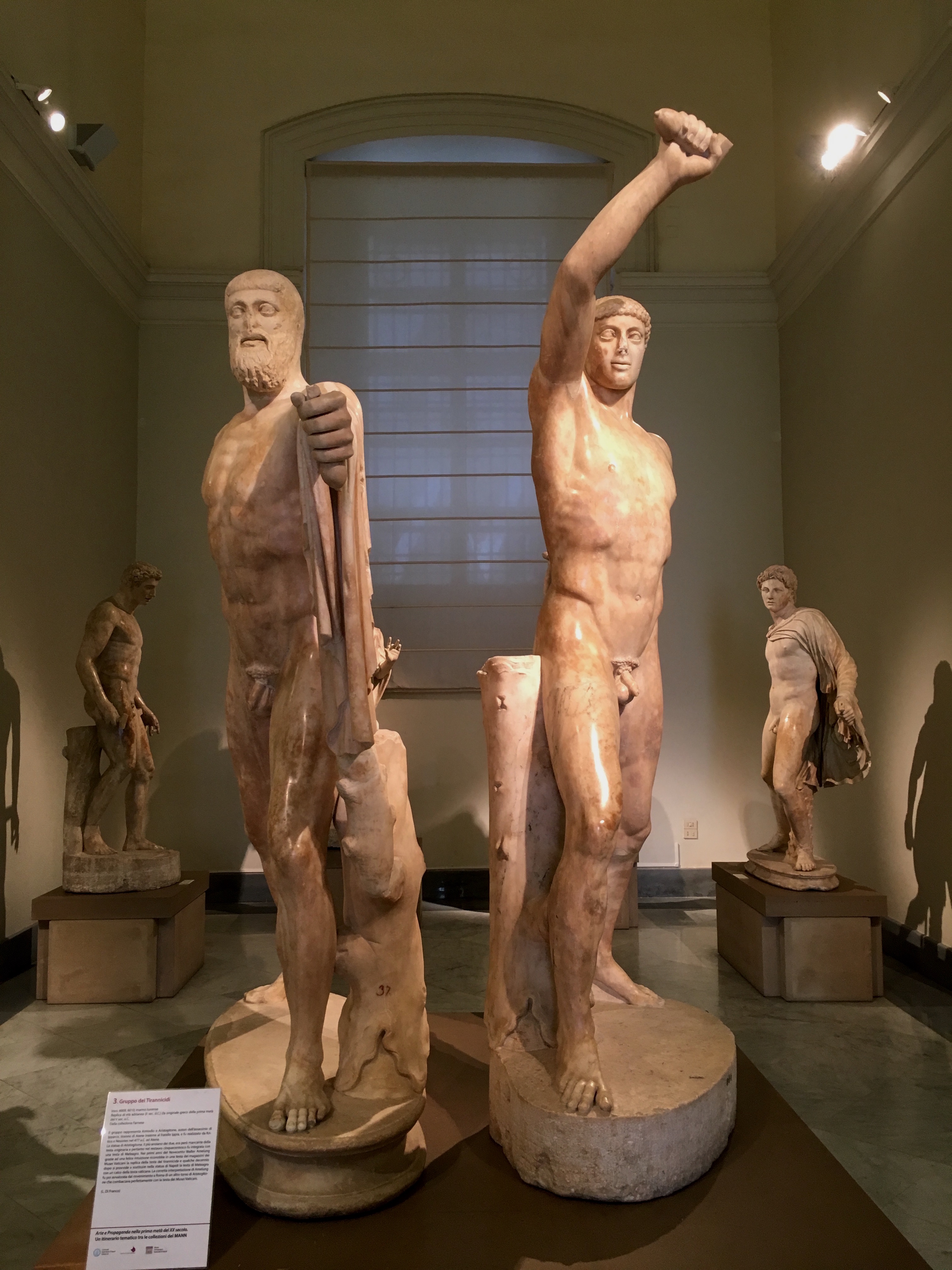 Nápoles. Museo Archeologico Nazionale. Grupo de los tiranicidas.